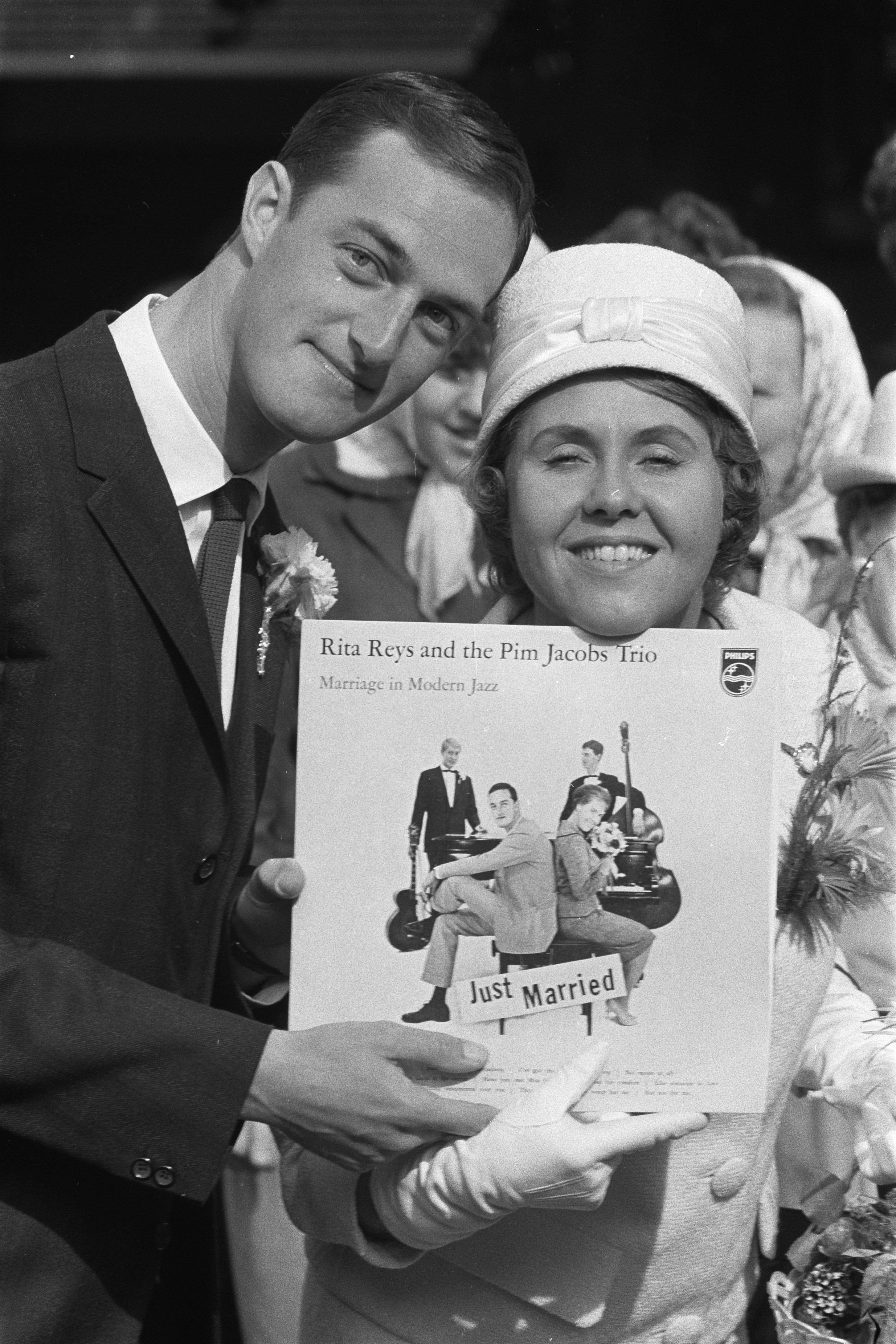 Collectie / Archief : Fotocollectie Anefo Reportage / Serie : [ onbekend ] Beschrijving : Huwelijk van Pim Jacobs en Rita Reys te Hilversum. Pim en Rita met hun laatste langspeelplaat Datum : 30 september 1960 Locatie : Hilversum, Noord-Holland Trefwoorden : huwelijken, langspeelplaten Persoonsnaam : Jacobs, Pim, Reys, Rita Fotograaf : Pot, Harry / Anefo Auteursrechthebbende : Nationaal Archief Materiaalsoort : Negatief (zwart/wit) Nummer archiefinventaris : bekijk toegang 2.24.01.05 Bestanddeelnummer : 911-6356